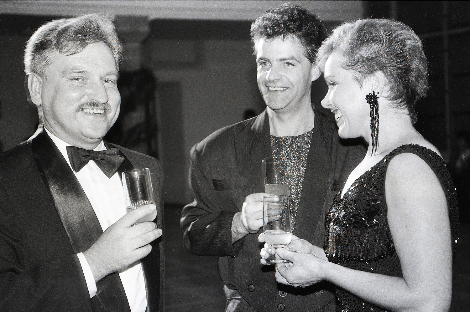 Anti Kalamees, Tõnu Kilgas ja Katrin Karisma 91